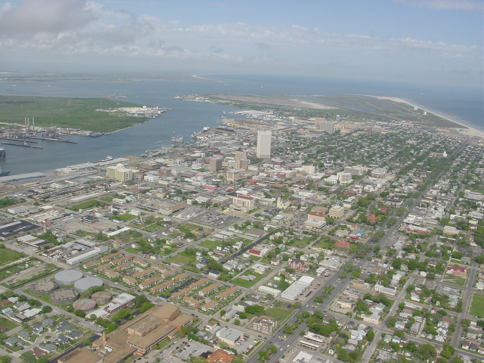 Survol de Galveston (Texas) Licensing Catégorie:Ville du Texas